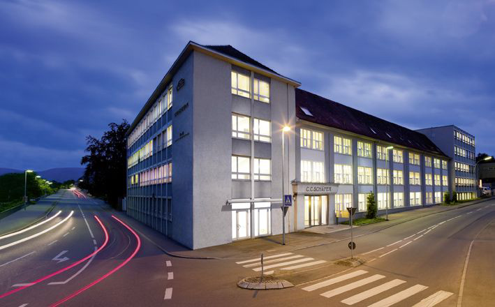 CECEBA Außen, heute